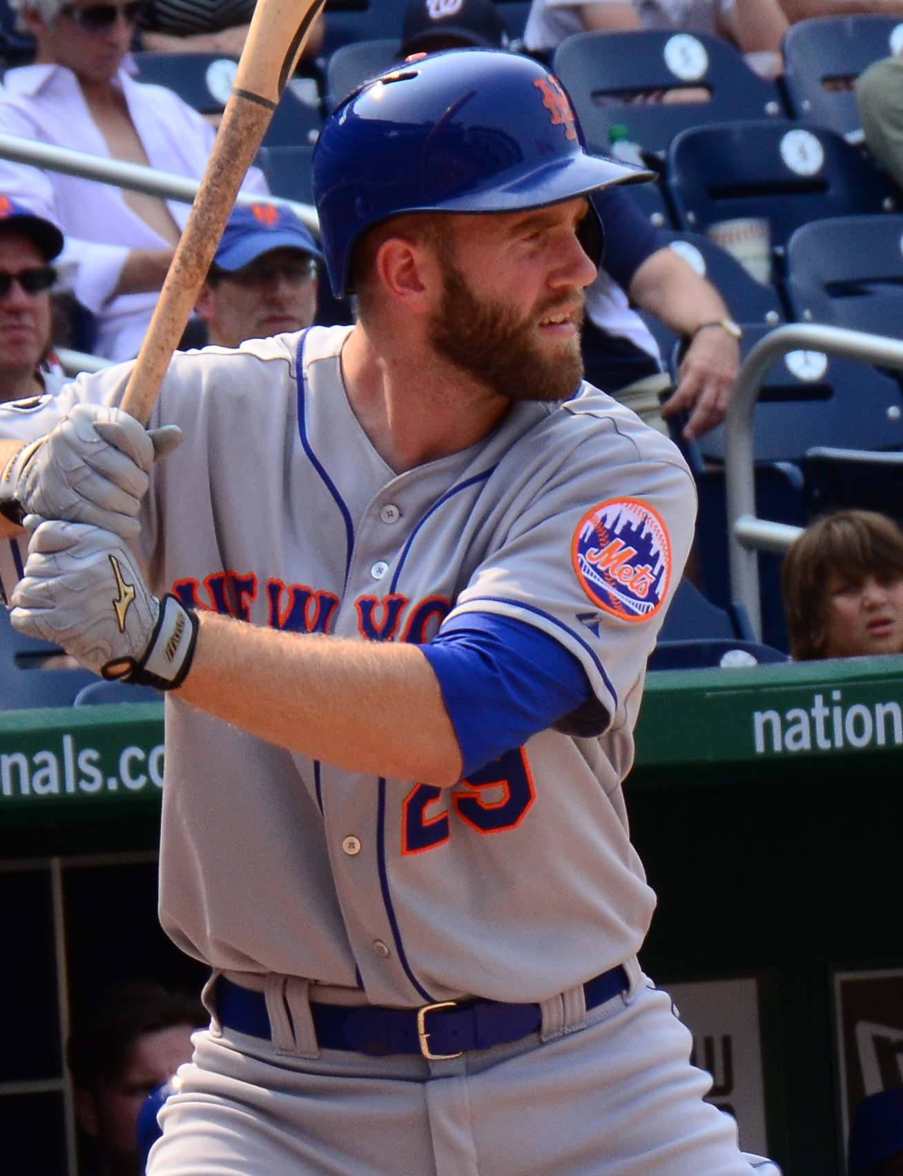 Eric Campbell, August 7, 2014.